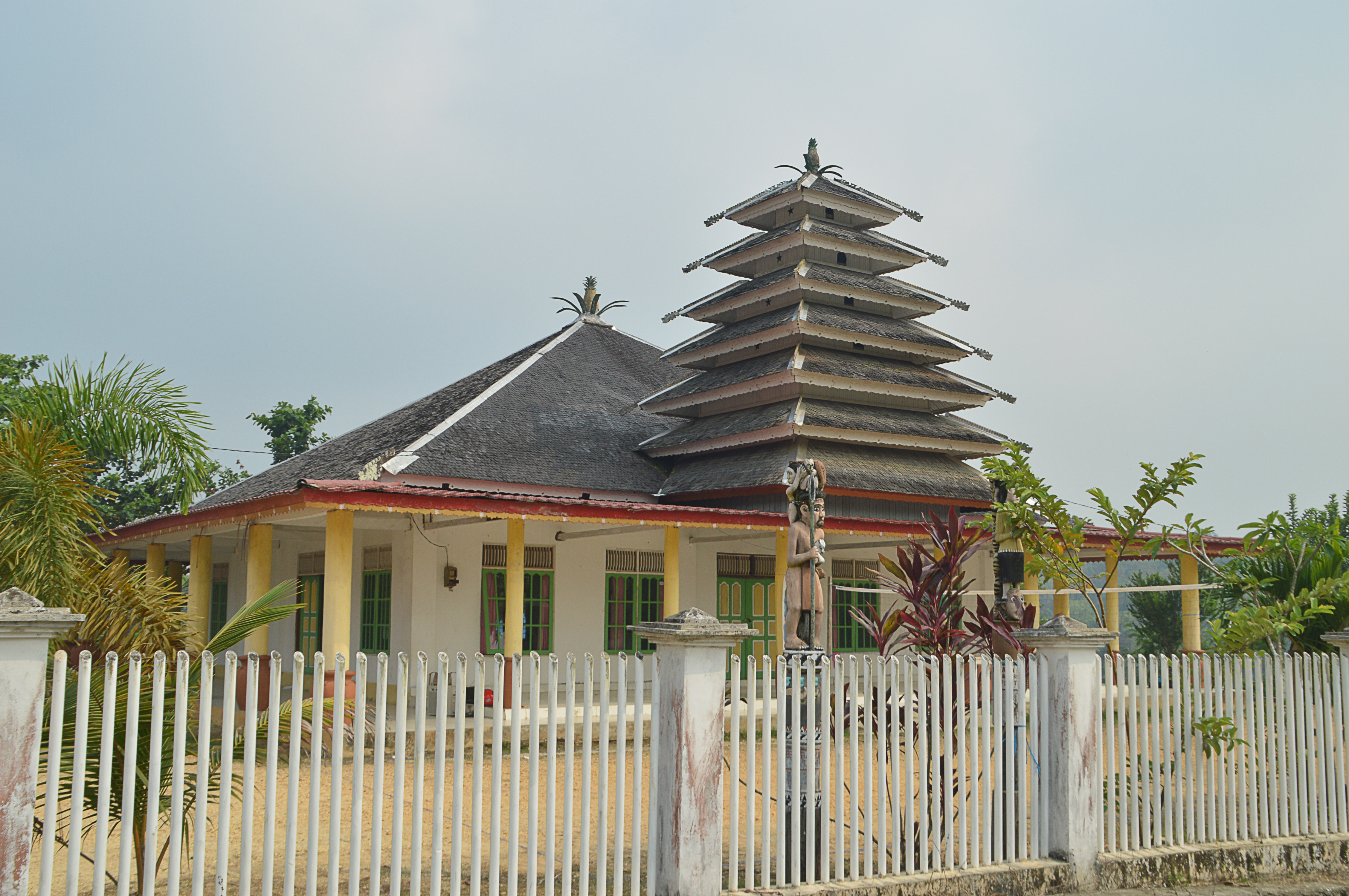 Balai Basarah Induk Intan, tempat ibadah umat Hindu Kaharingan di kota Muara Teweh, Kalimantan Tengah.